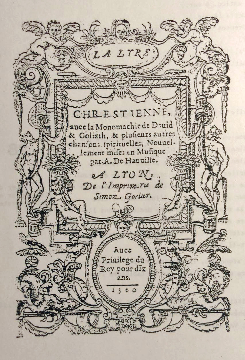 Title page of Antoine de Hauville La Lyre Chrestienne (Lyon, 1560).